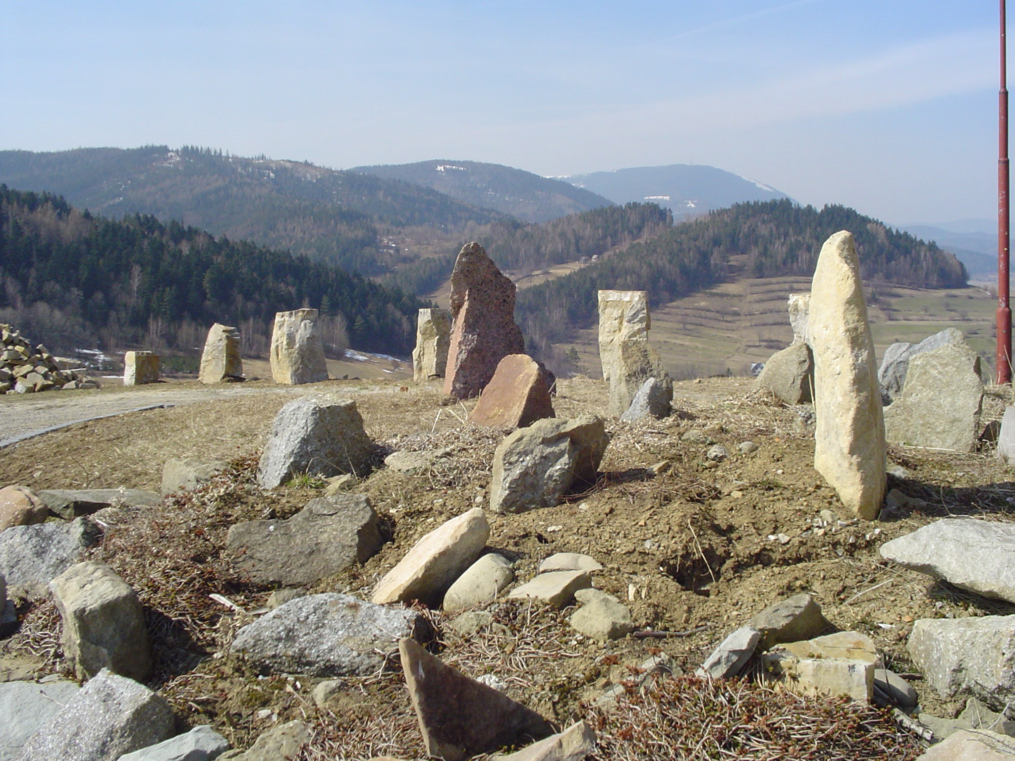 W oddali Skrzyczne widziane ze szczytu Matyski w Radziechowach, zdjęcie własne